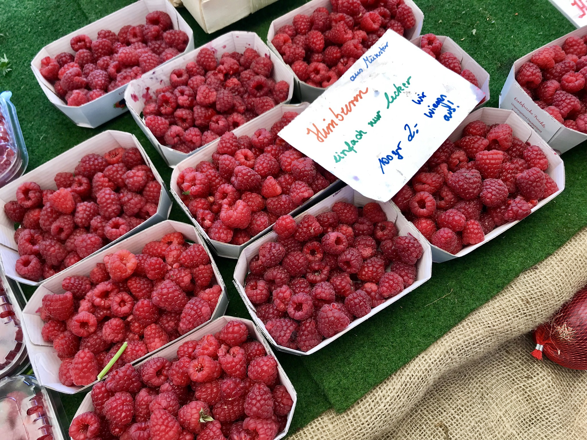 Himbeeren auf dem Wochenmarkt Münster